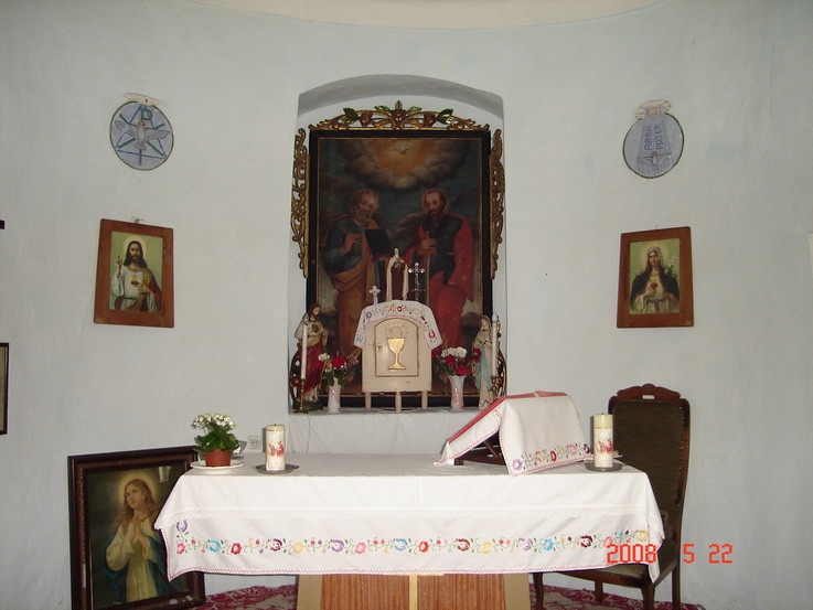 Kurtapataki kápolna oltára, Erdély